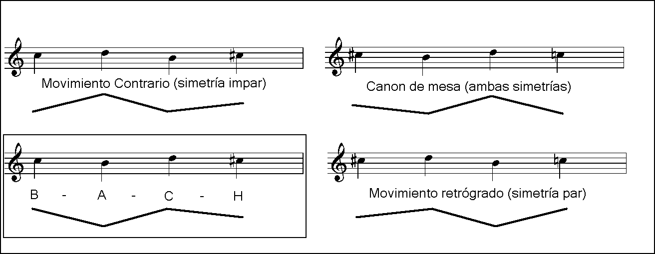 Esquema de los tipos de simetrías entre un tema y sus variantes contrapuntísticas